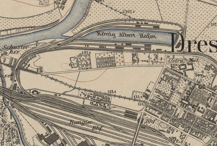 Alberthafen Dresden Topografische Karte 1:25000 1904